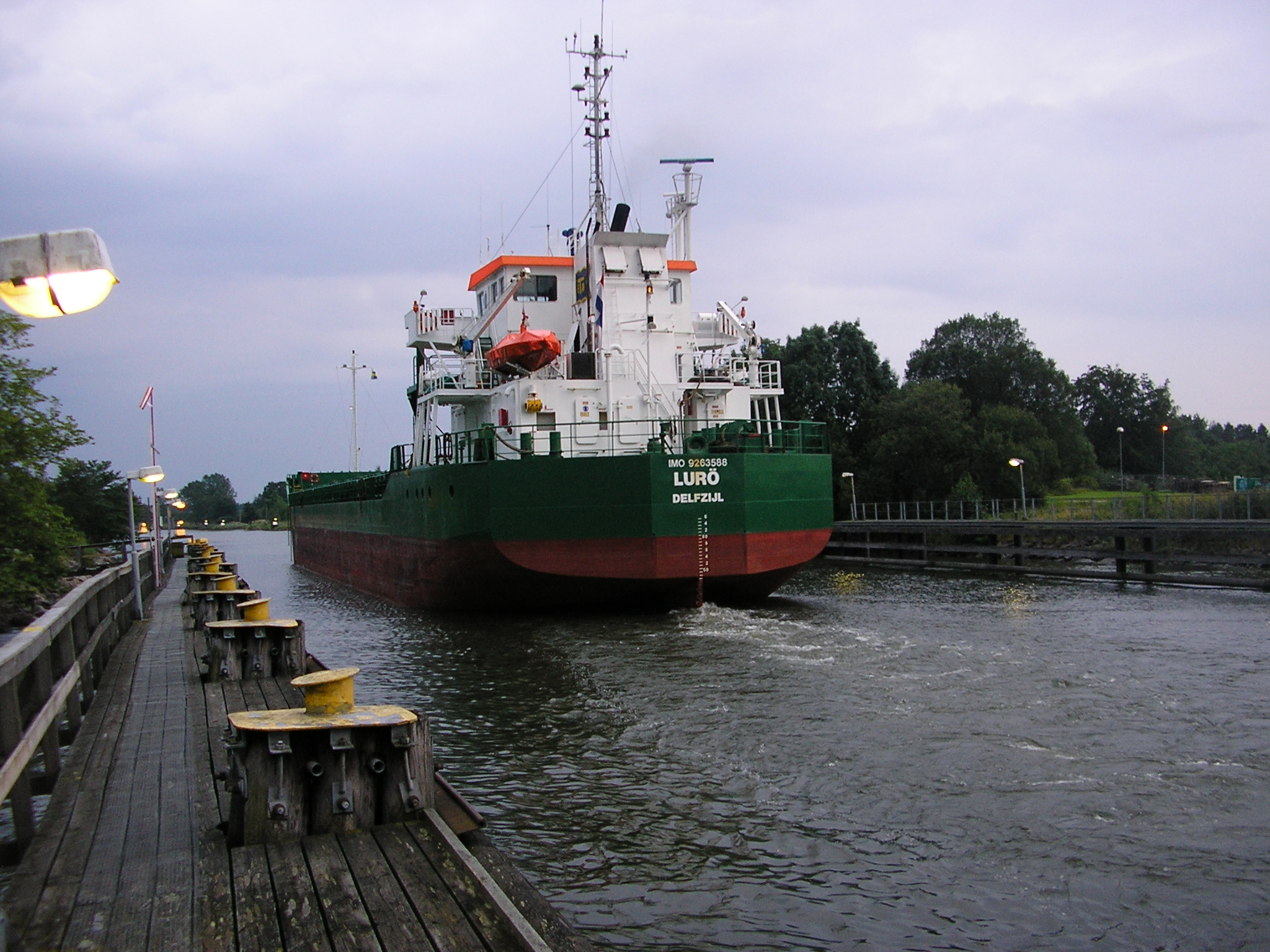 M/S Lurö i Karls grav, direkt efter Gropbron.